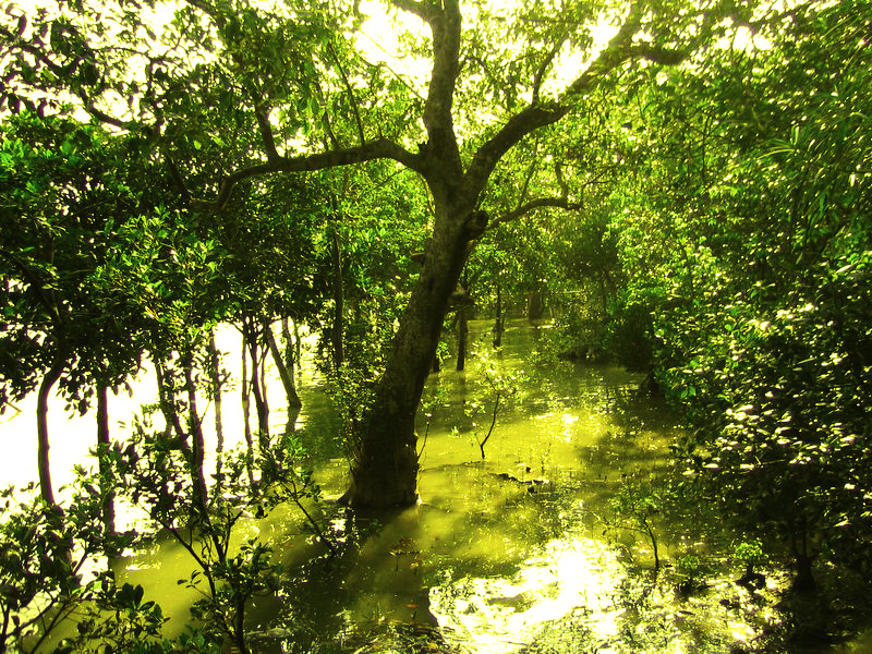 View of Sundari trees in Sundarbans, Bengal